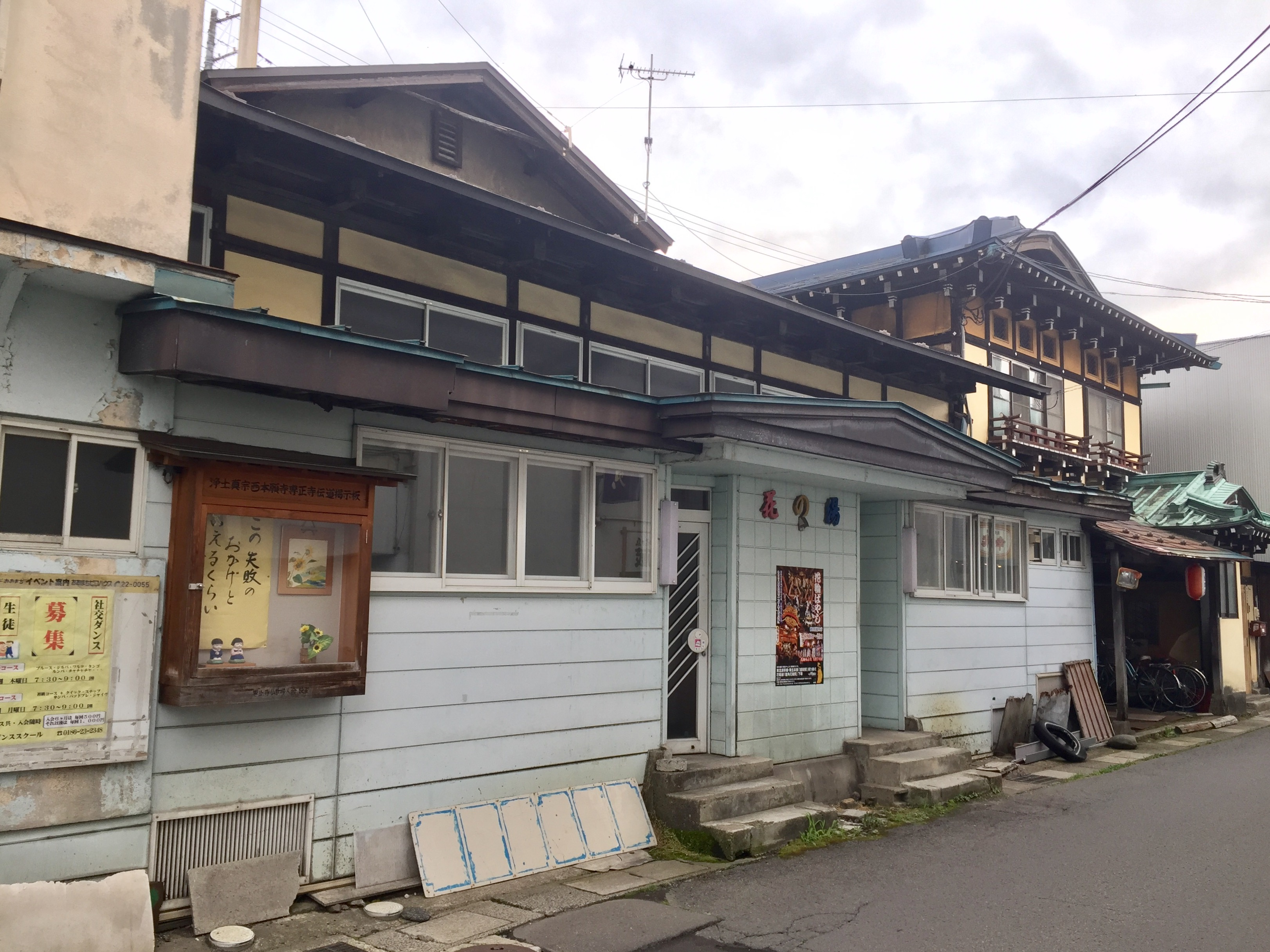 秋田県鹿角市花輪の「花の湯」。天保7年（1836年）に南部藩より認可、昭和13年（1938年）築。2014年（平成26年）12月廃業（2017年8月時点で建物は現存）。